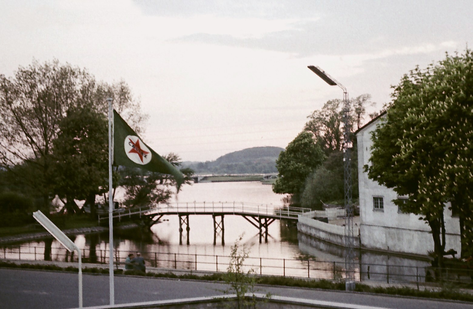 Haderslev, Sönderbro 1959